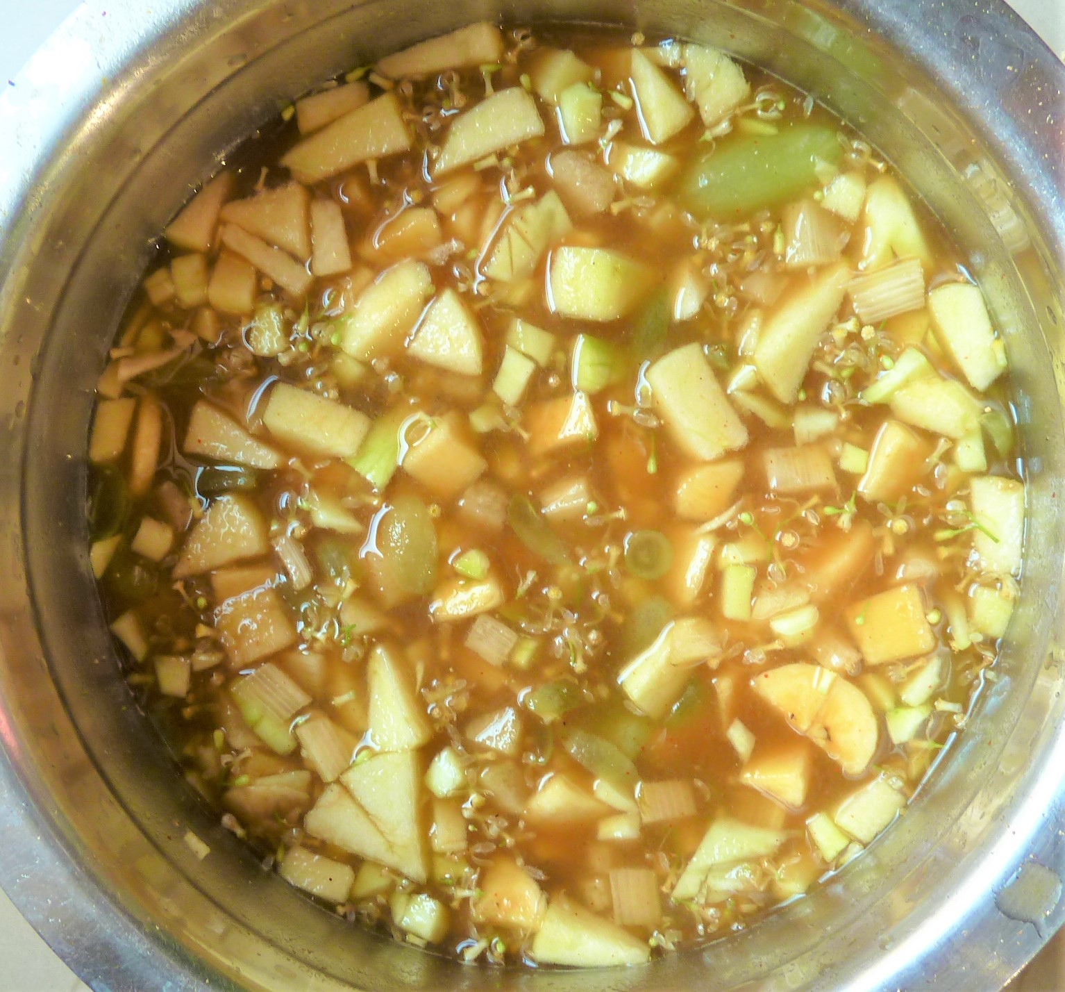 ఉగాది పచ్చడి